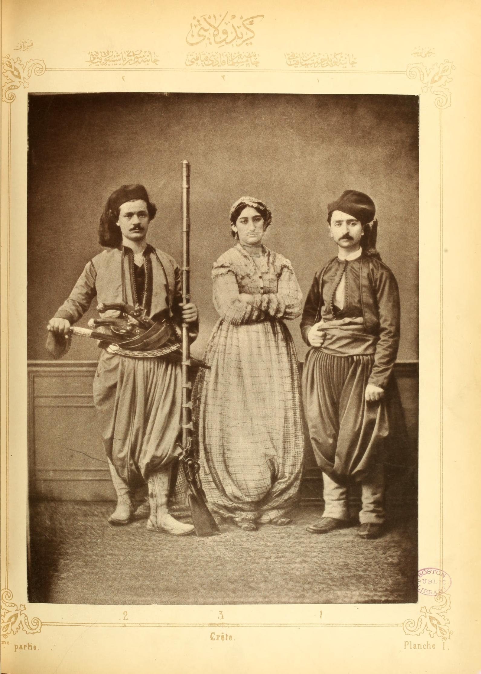 VILAYET DE KRID (crête) PLANCHE I: Bourgeois chrétien de Hanïa Cavalier chrétien de Hanïa Dame musulmane de Hanïa